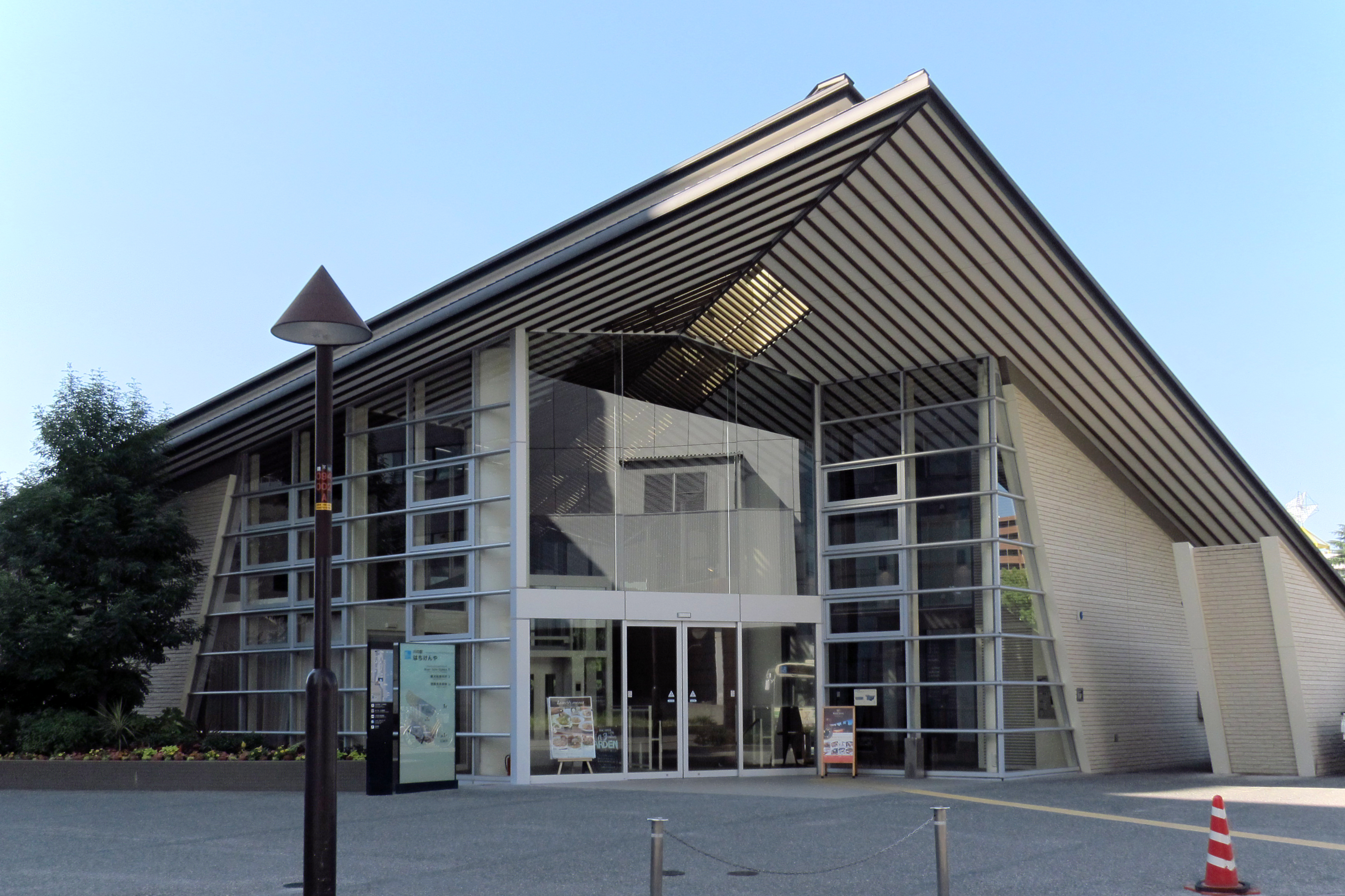 Hachikenya (八軒家船着場、川の駅はちけんや), Osaka, Osaka prefecture, Japan